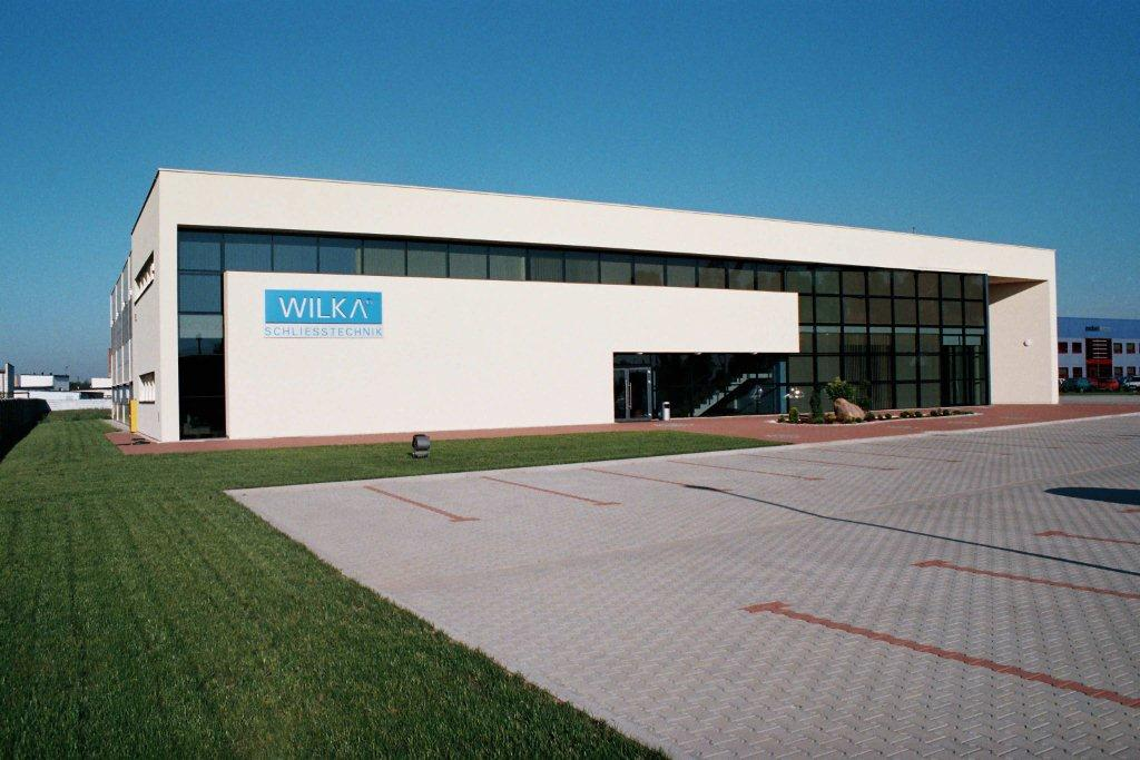 WILKA Polska in Leszno (Polen)